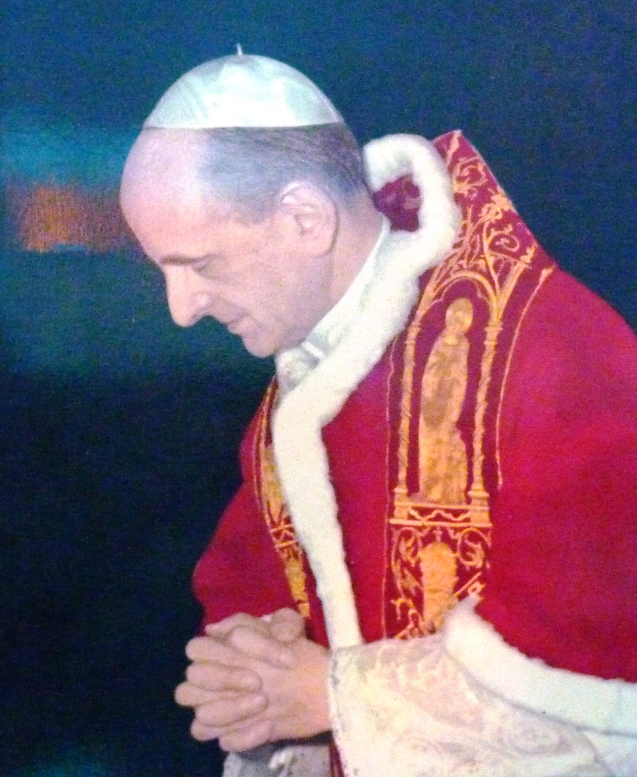 Đức Giáo Hoàng Phao-lô đệ lục